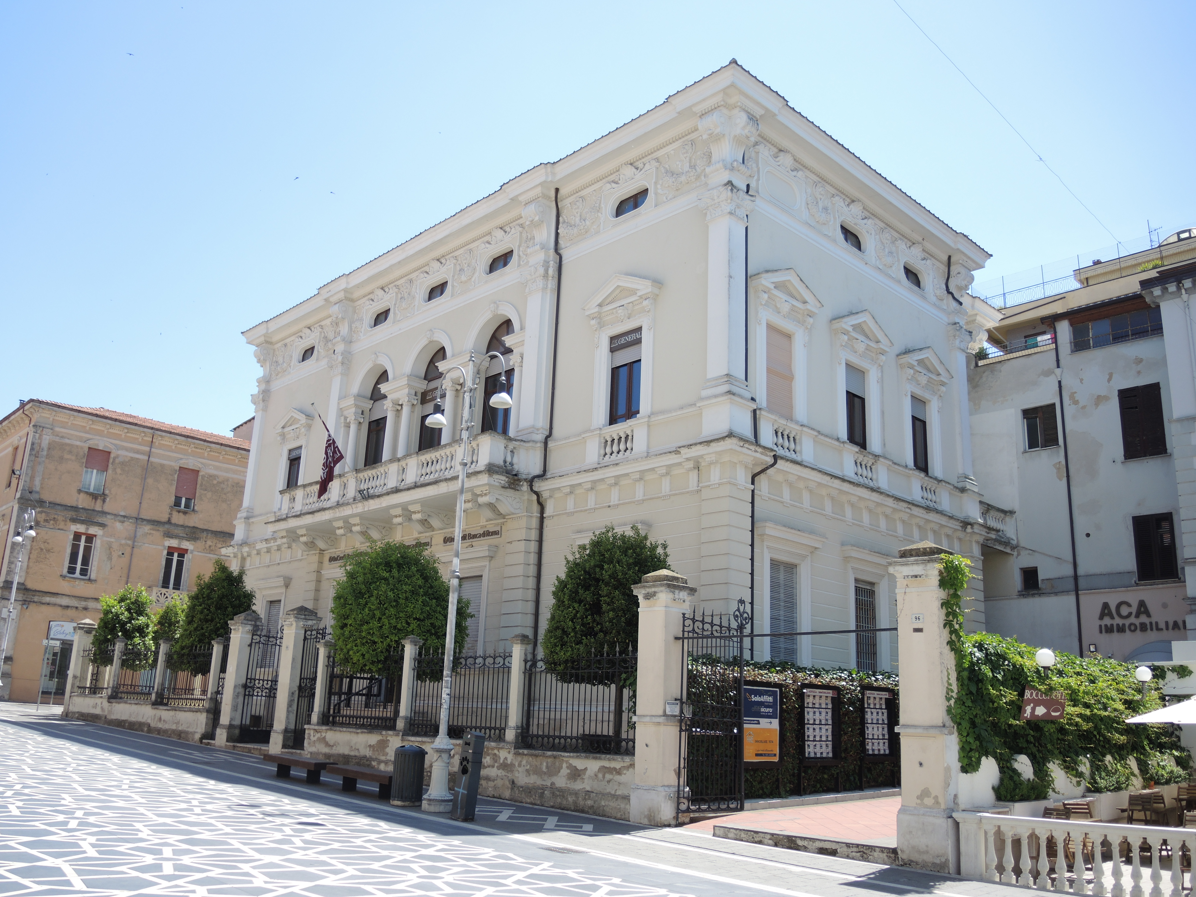 Lanciano